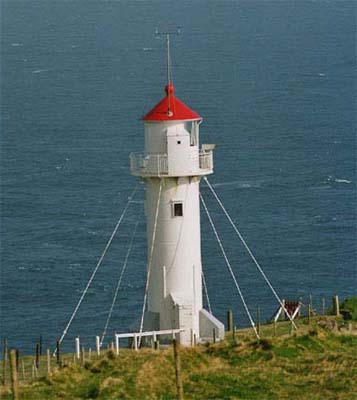 Leuchtturm Akraberg, Färöer April 2004